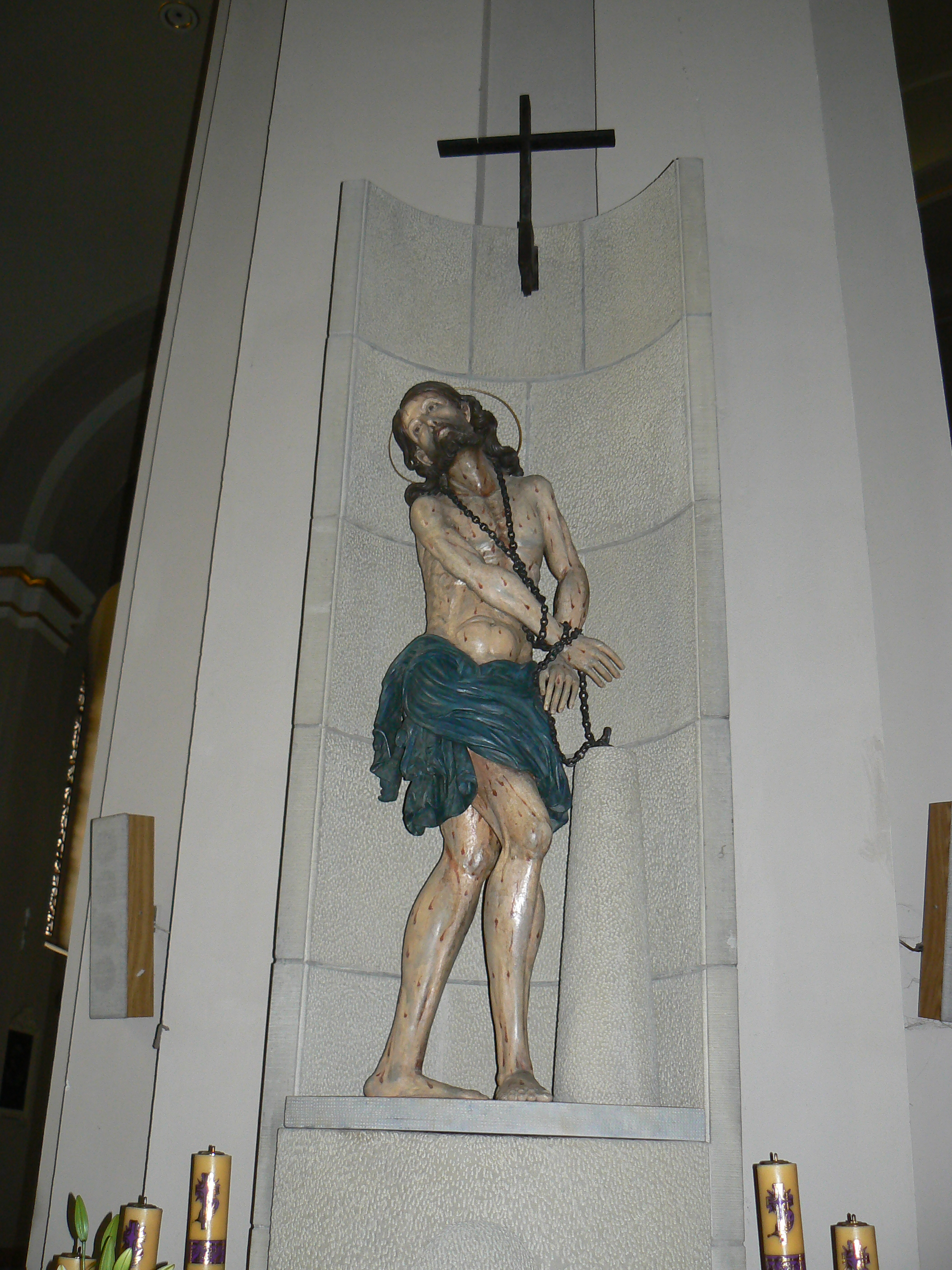 Figura Pana Jezusa w Więzieniu w kościele Narodzenia Najświętszej Maryi Panny w Gorlicach